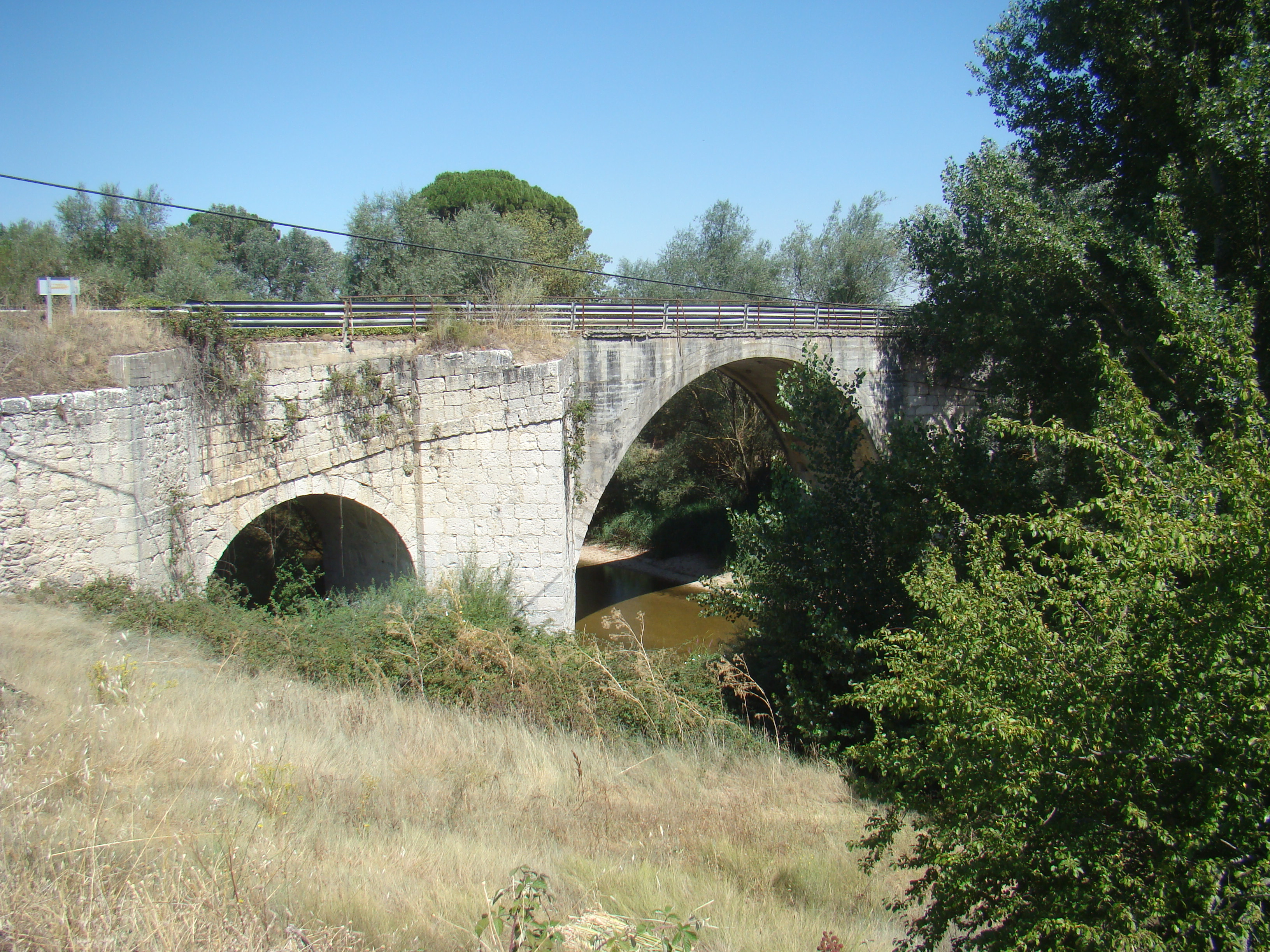 Puente de Aniago sobre el río Adaja que perteneció al lugar llamado Aniago, hoy despoblado. Valladolid, España.